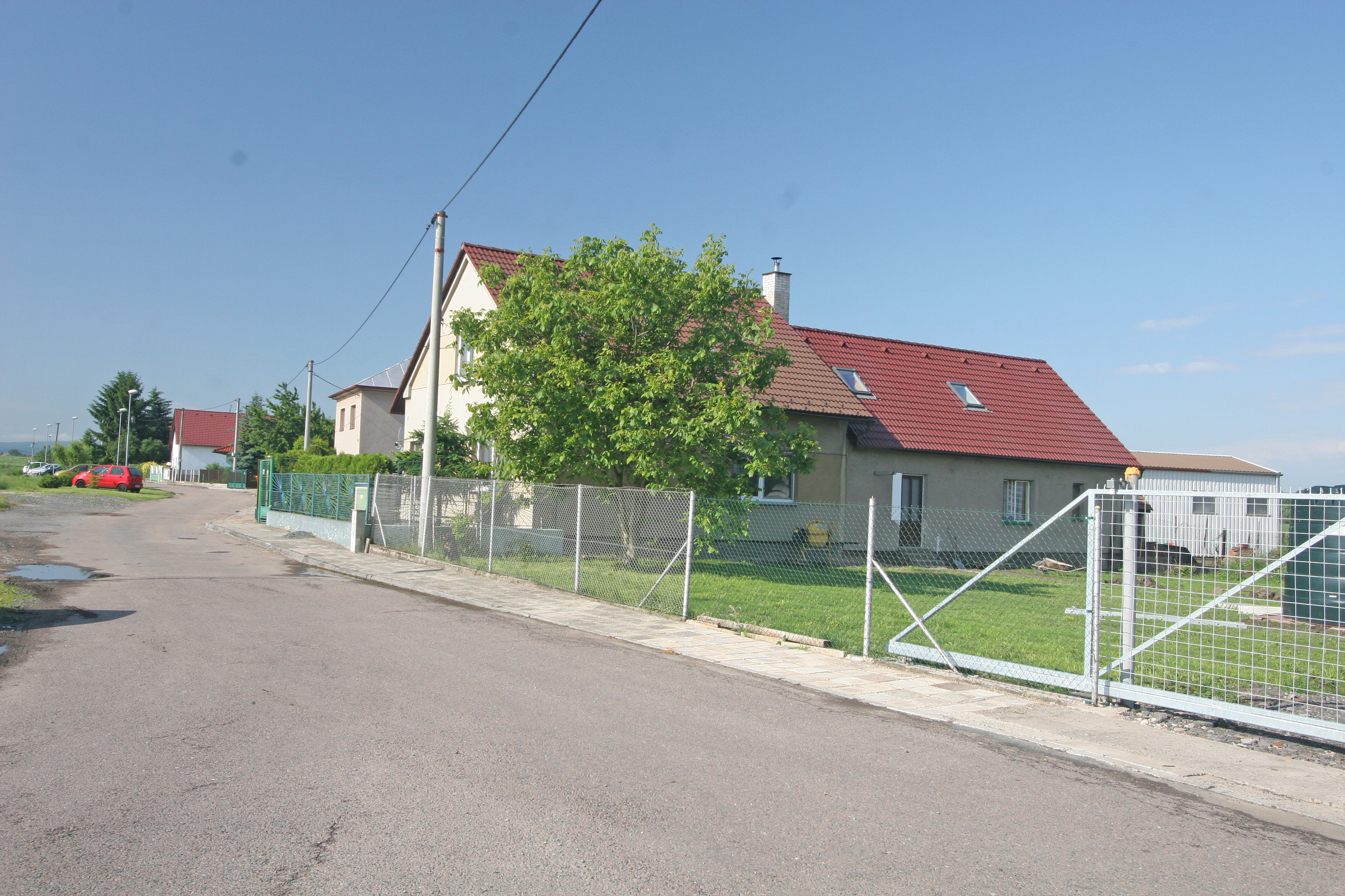 Staré Čívice čp. 63